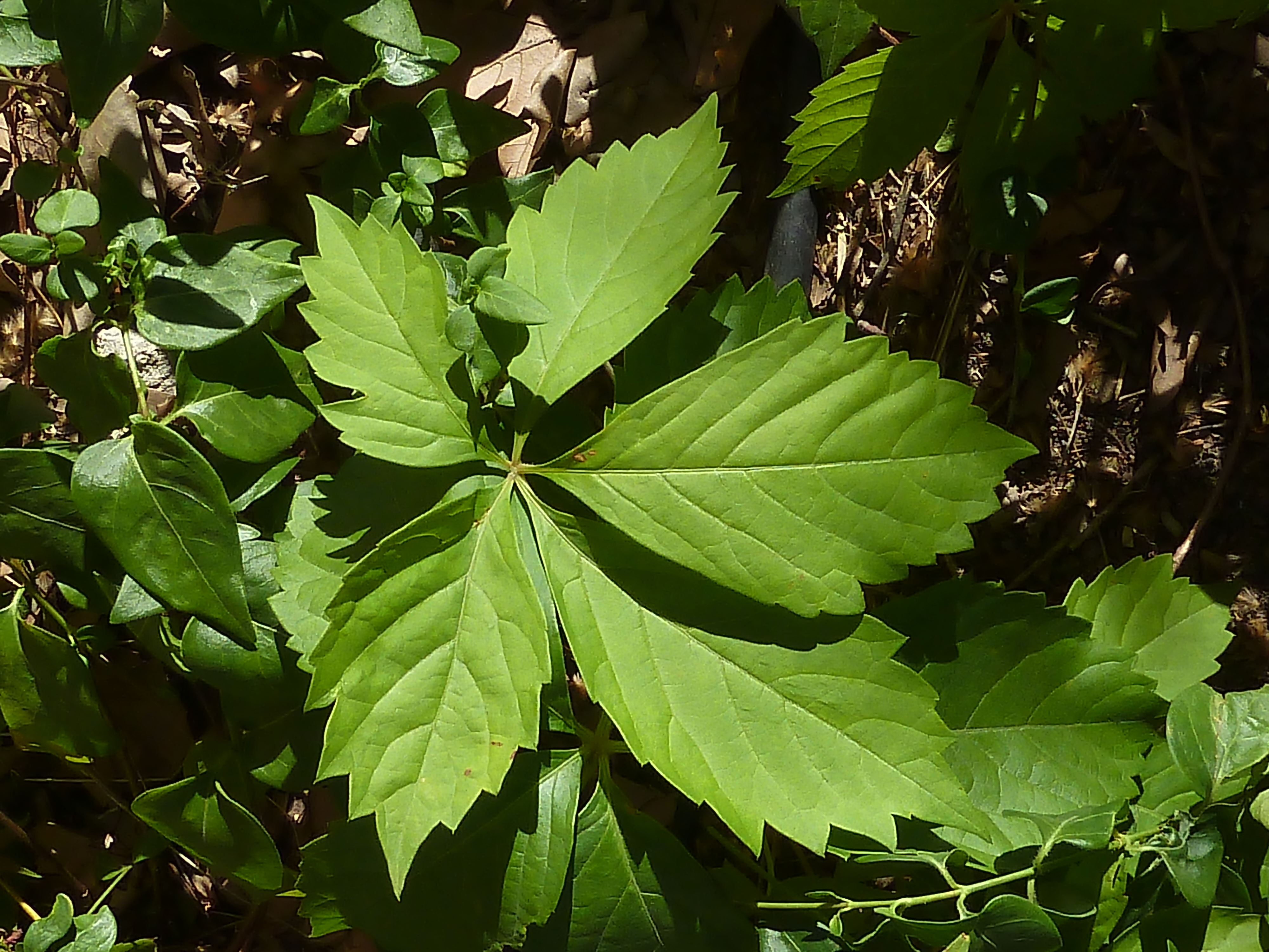 Parthenocissus quinquefolia (viña virgen) - Hoja de un individuo rastrero. - Esquina Joaquín Costa con Pablo Aranda, Madrid (España).